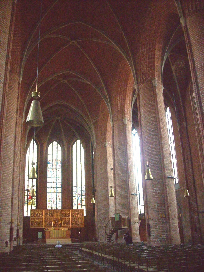 Hannover, Marktkirche, Interior